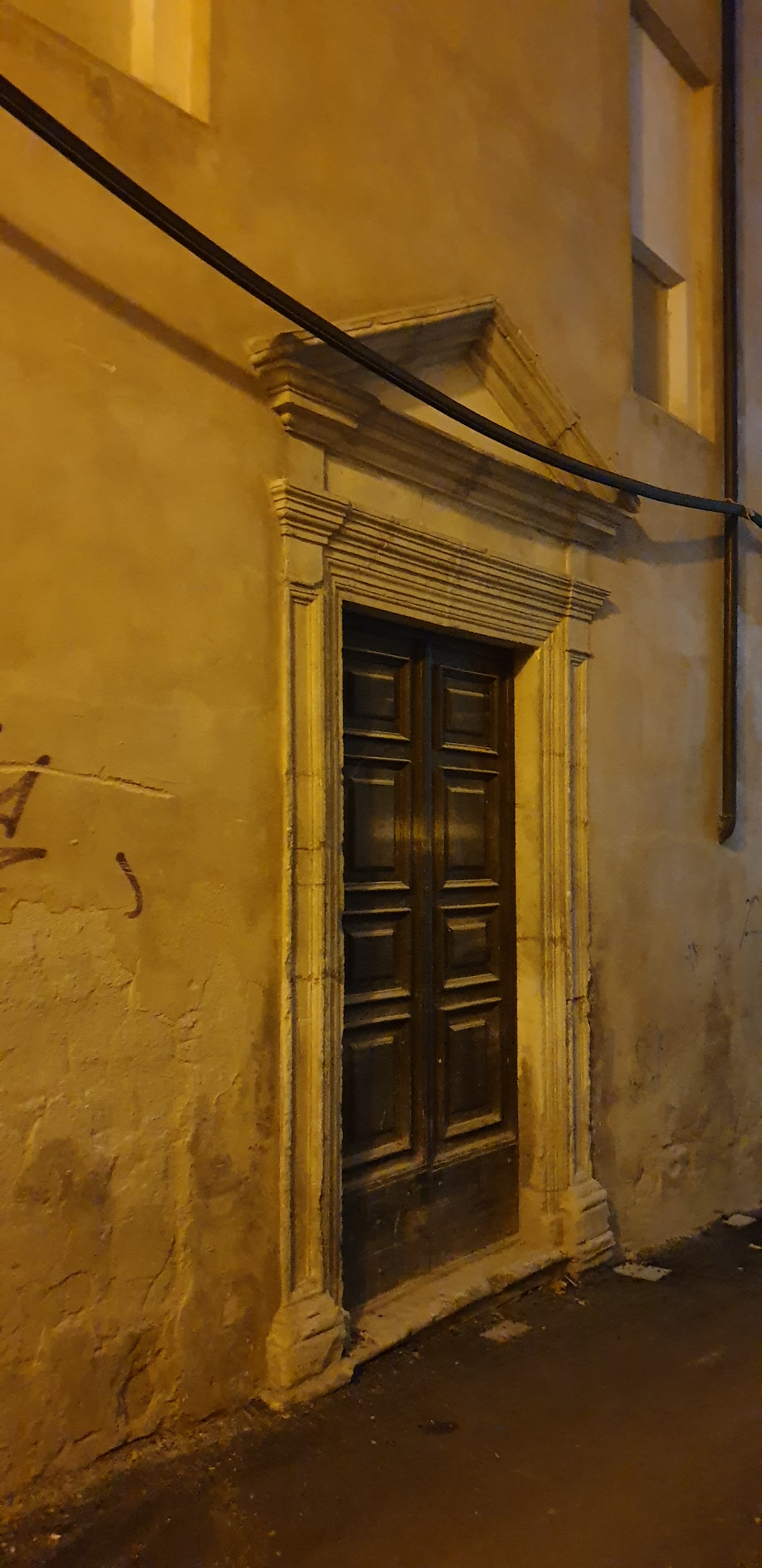 L'Aquila: Santa Maria dei Raccomandati